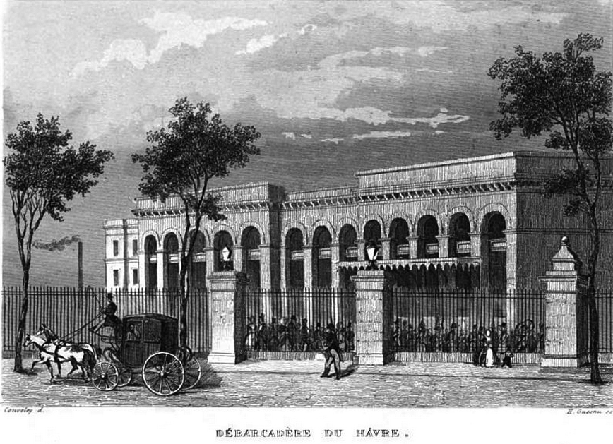 Gravure du débarcadère voyageurs de la gare du Havre en 1847. Bâtiment du à l'architecte William Tite.